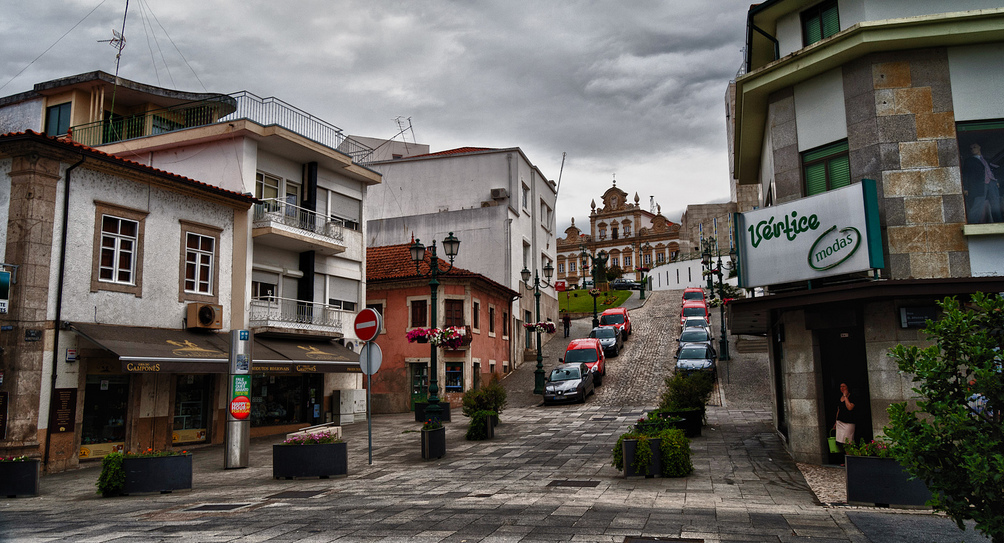 Mirandela